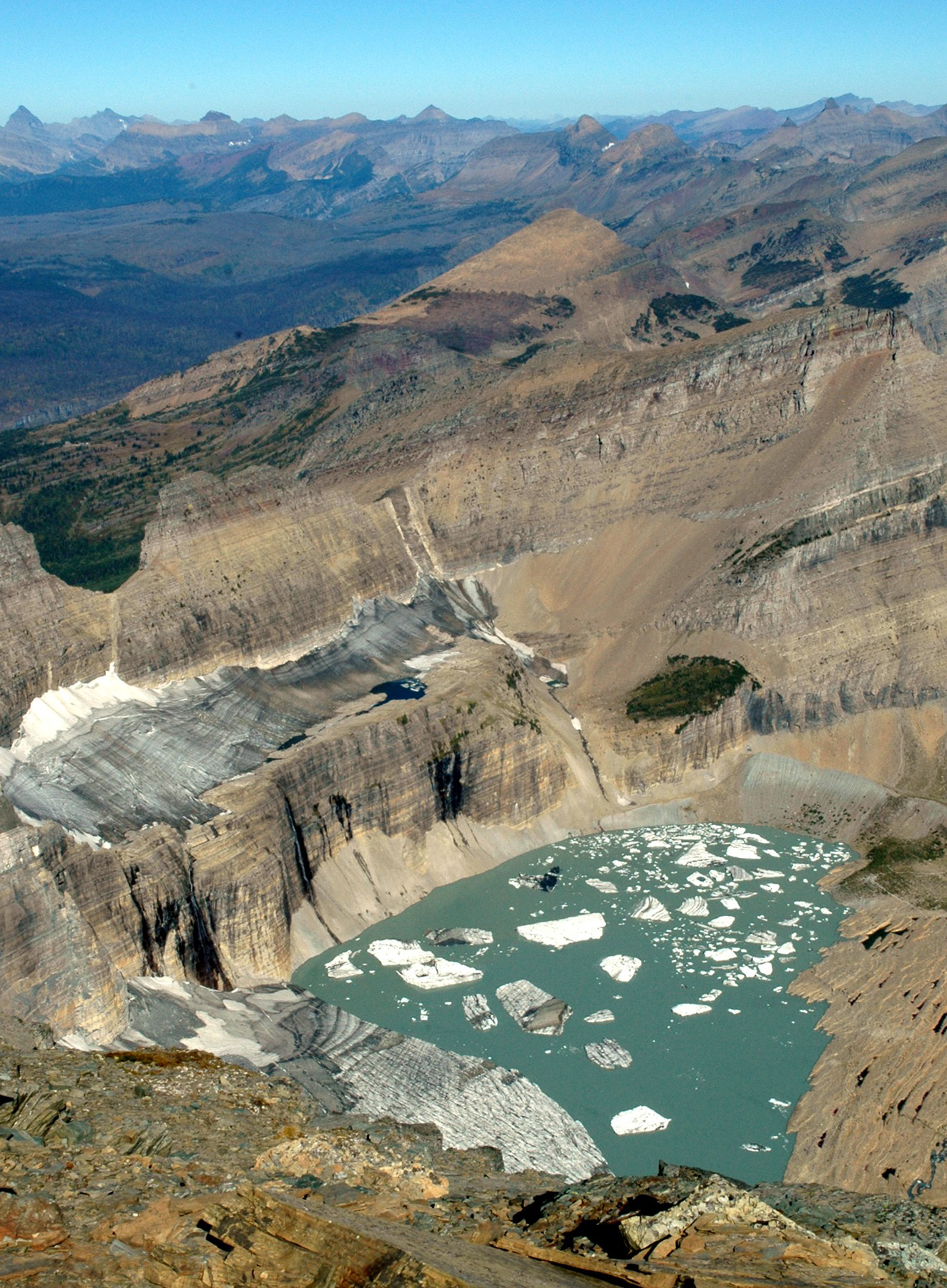 Grinnell Glacier in Glacier National Park (US) in 2005